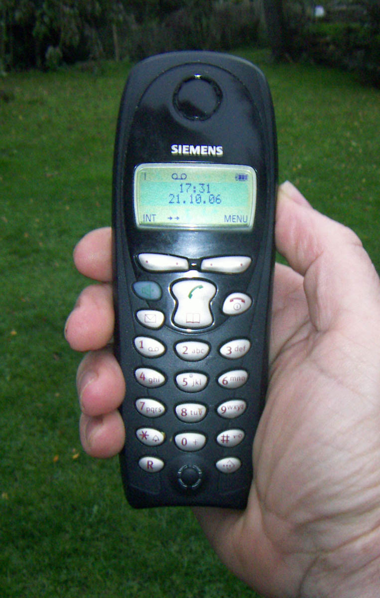 Schnurlostelefon